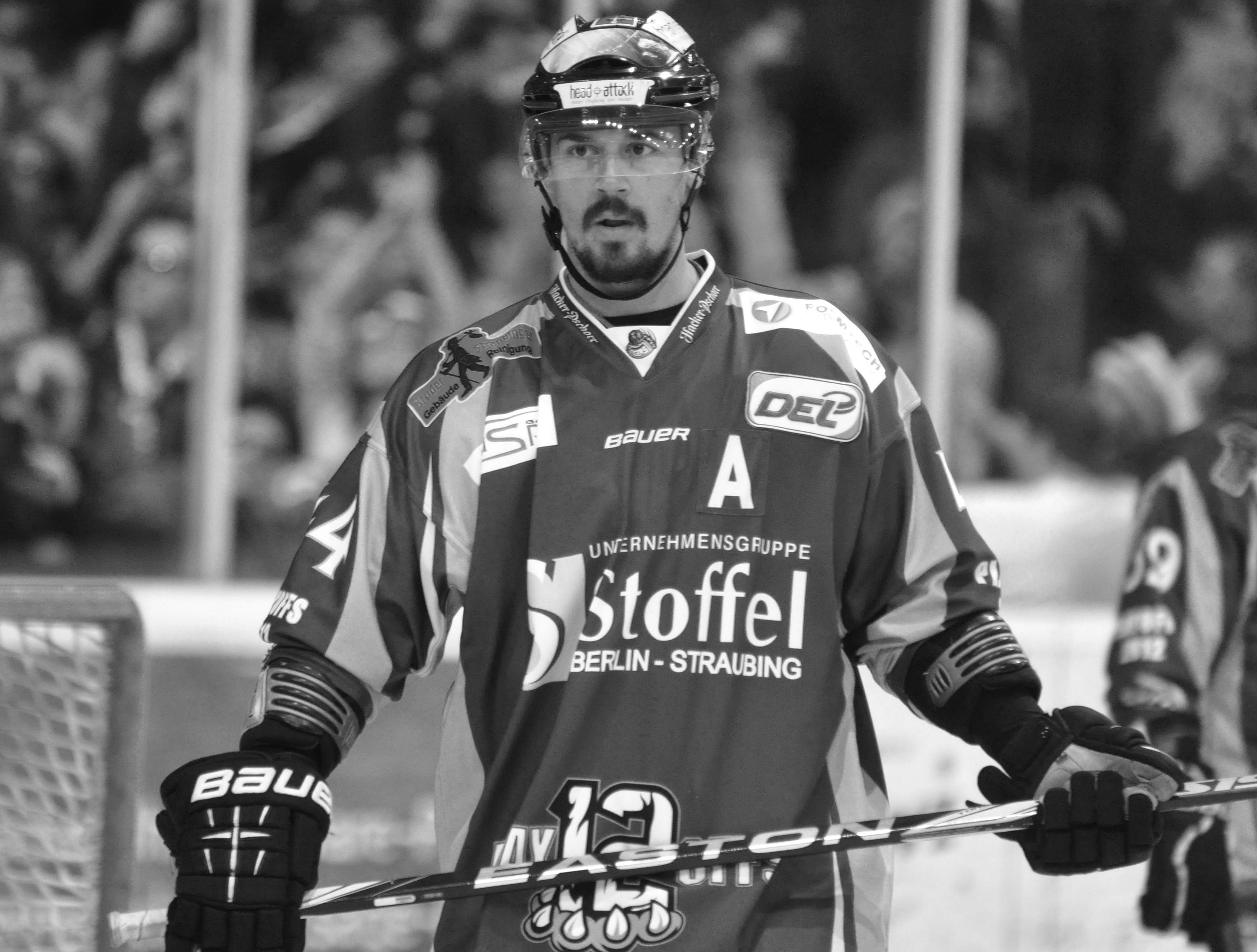 Straubing Tigers - Eisbären Berlin 11.04.2012 DEL PlayOff Halbfinale